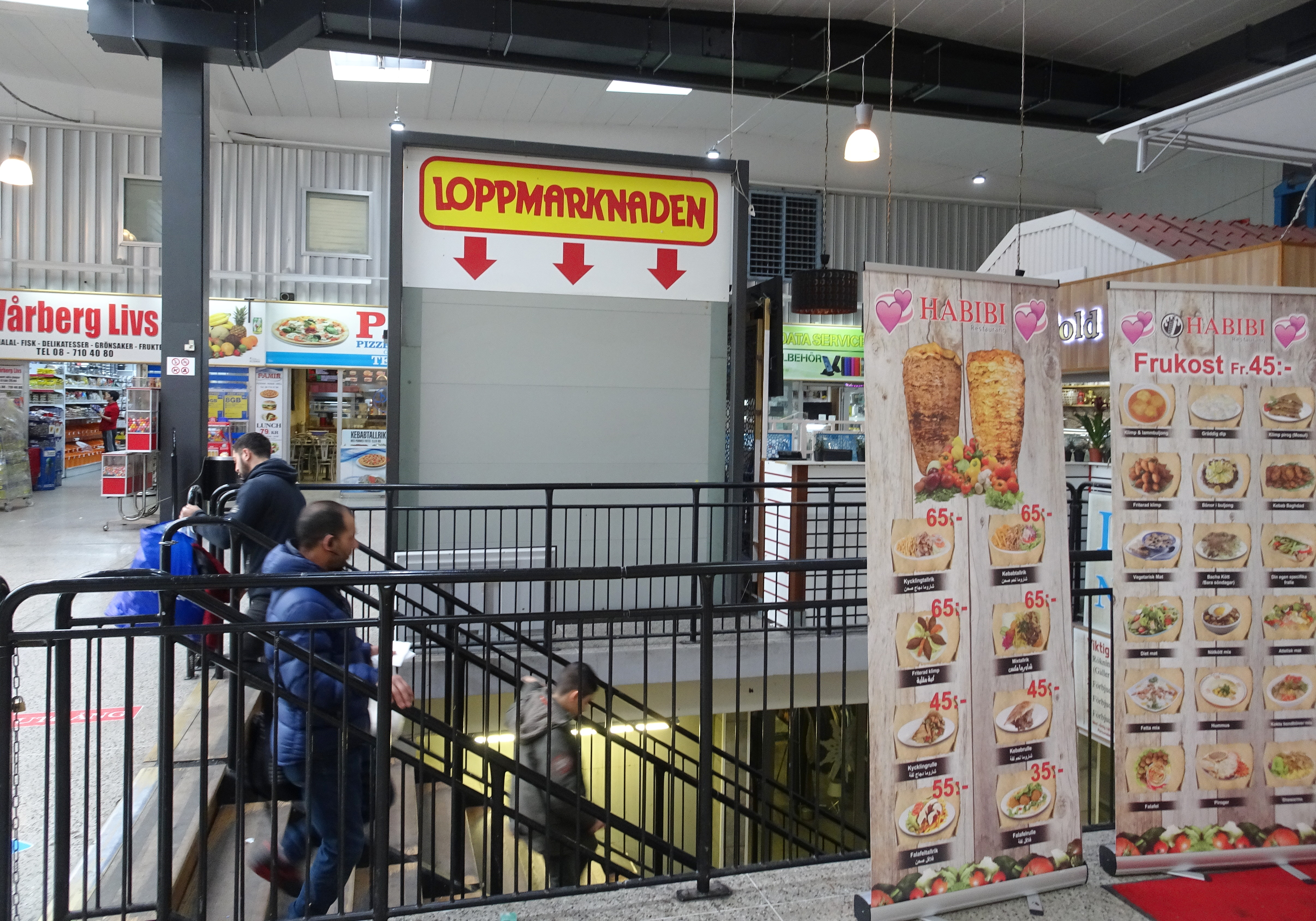 Vårberg centrum, invigd i september 1968, arkitekt Hack Kampmann